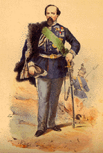 generale Enrico Cialdini, circa 1860.